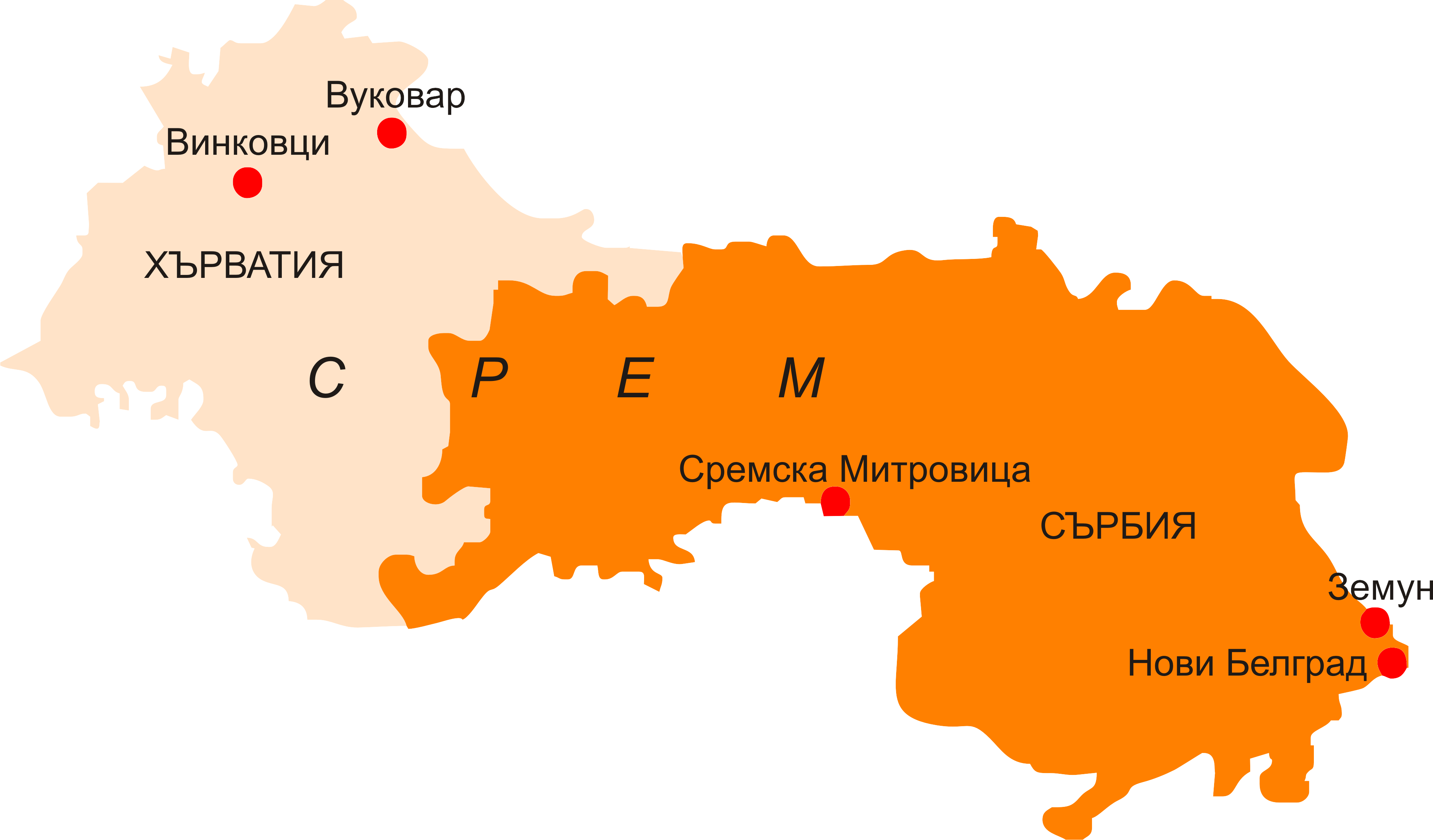 Карта на Сремска област между Хърватско и Сърбия